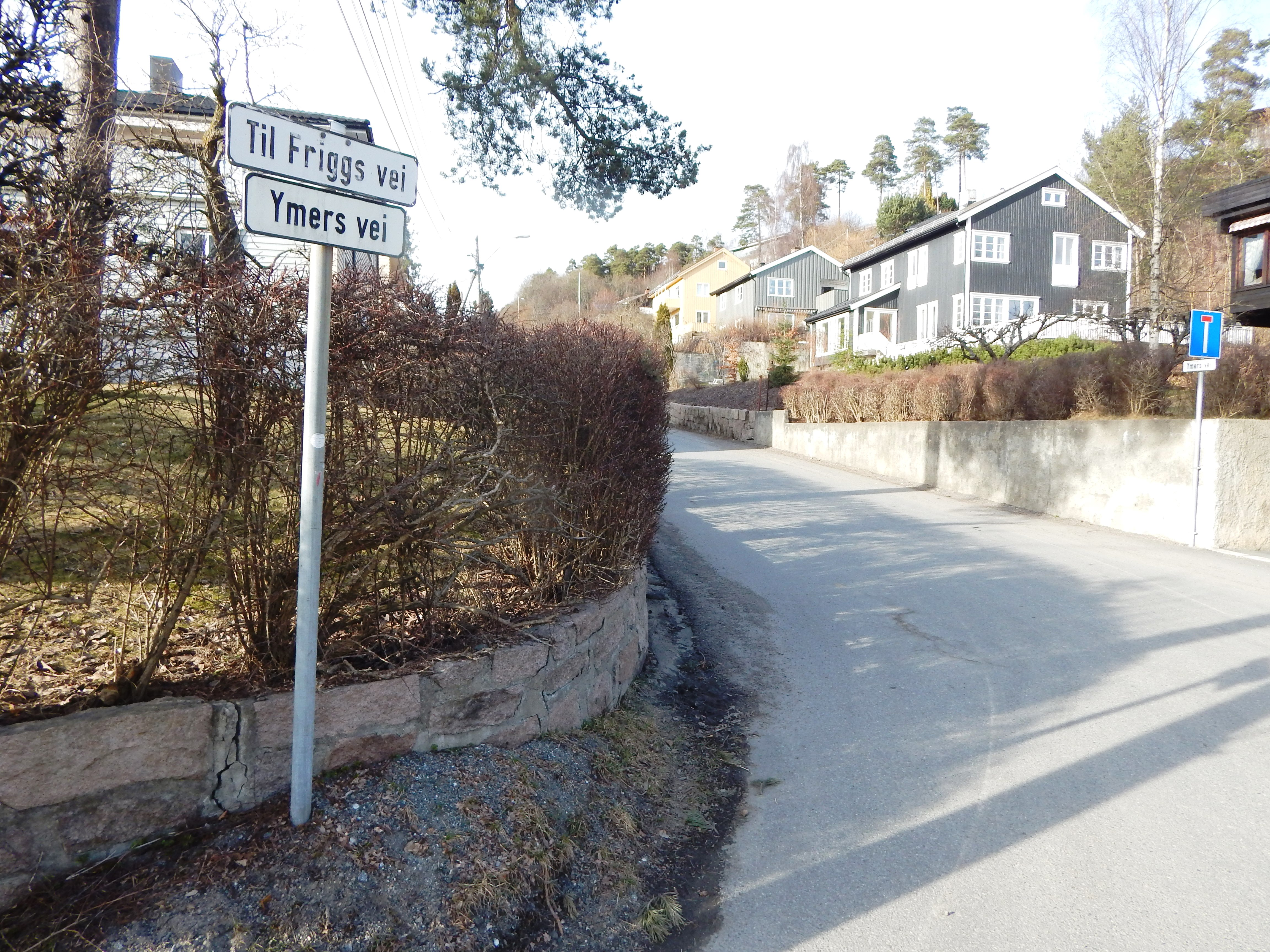 Ymers vei sett fra Mons Søviks plass